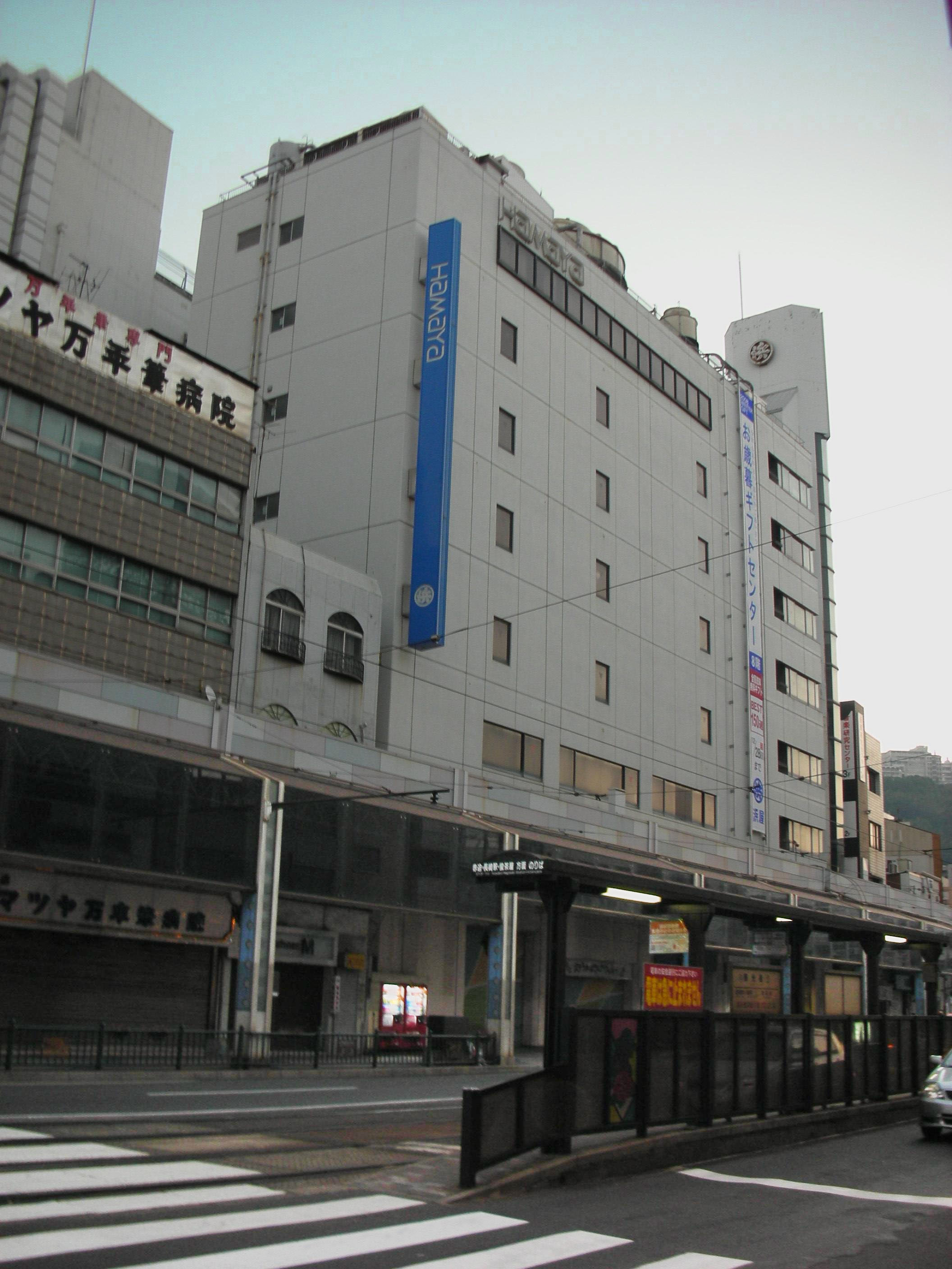 長崎県長崎市浜屋百貨店。